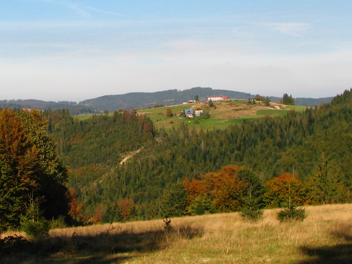 Hala Boracza z Hali Cukiernicy Wyżniej